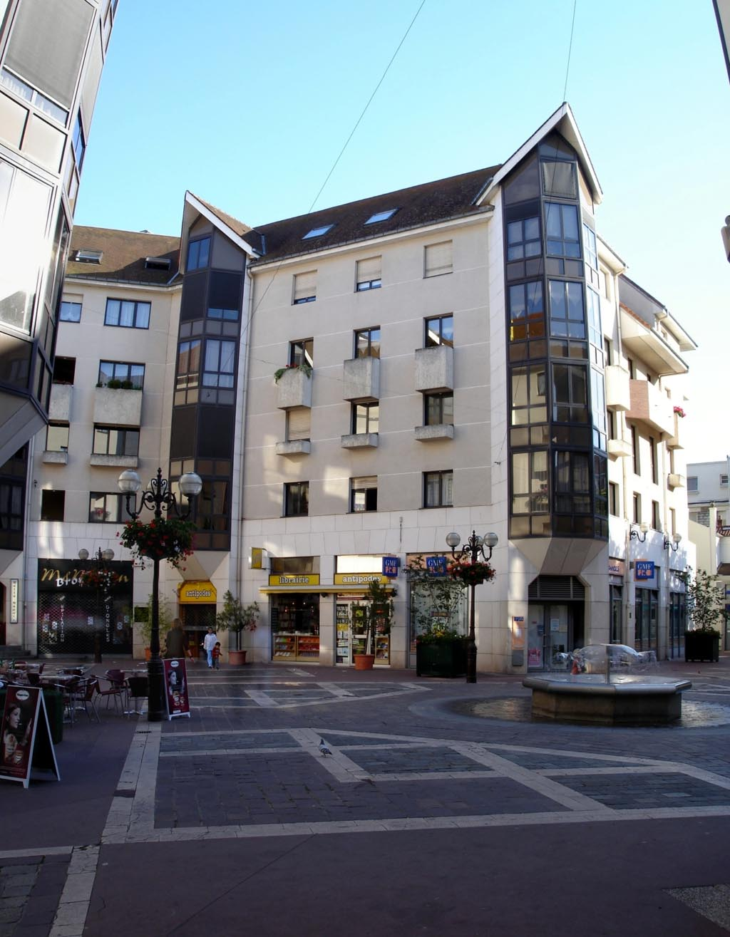 La place de l'Europe (ZAC Centre-ville) à Enghien-les-Bains (Val-d'Oise), France Juillet 2007 Photo personnelle (own work) de Clicsouris